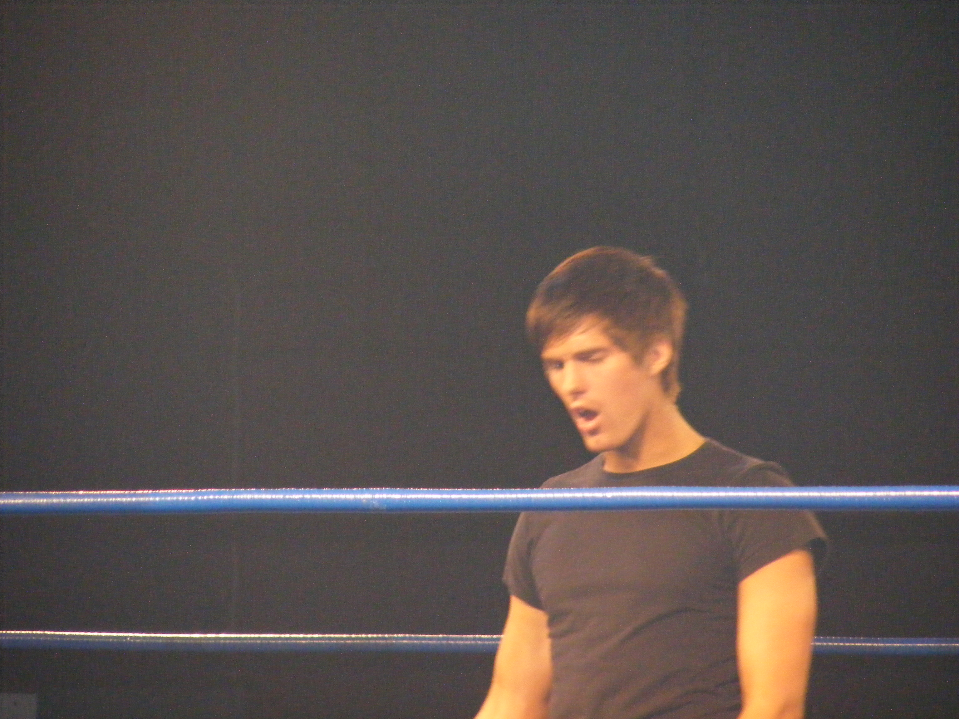 Zack Sabre, Jr. en avril 2011 durant un spectacle de la Chikara.